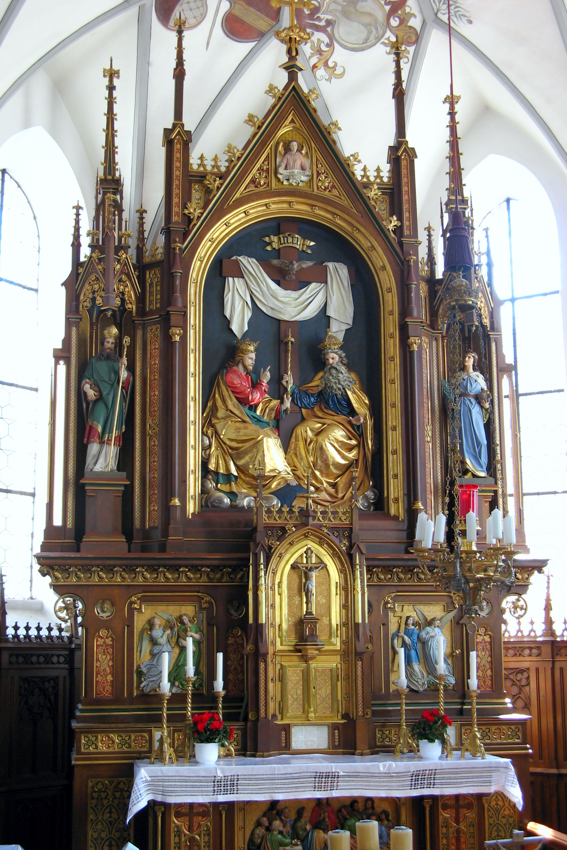 Neugotischer Hochaltar in Rettenbach/Auerberg von Josef Beyrer